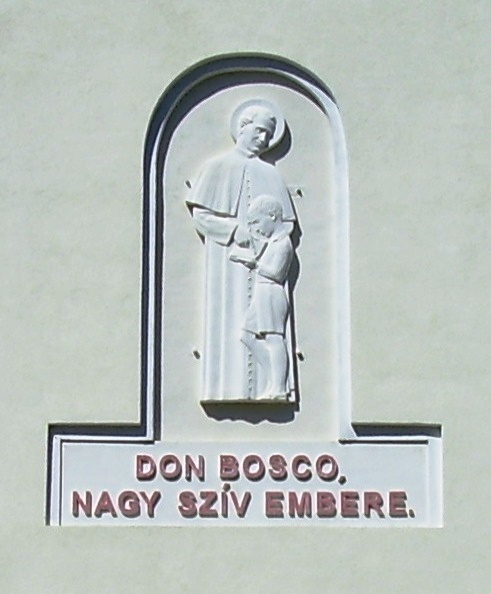 A Don Bosco Általános Iskola, Szakiskola, Középiskola és Kollégium (Kazincbarcika) homlokzatán található a dombormű és a felirat: Don Bosco, nagy szív embere.